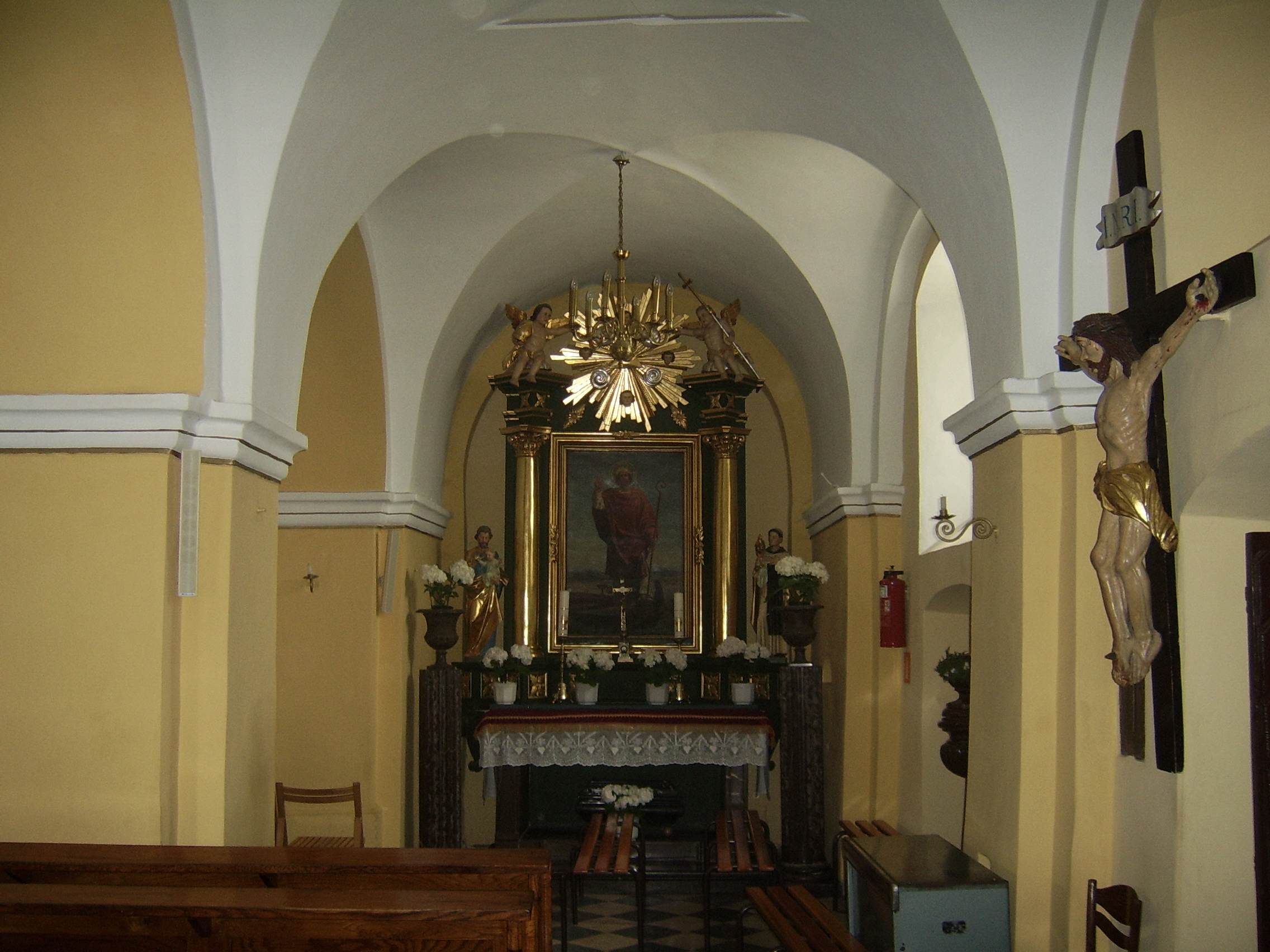 Kościelec (województwo małopolskie) - kościół pw. św. Wojciecha, ołtarz boczny południowy, barokowy z I połowy XVIII wieku z obrazem św. Wojciecha z 1872 roku.